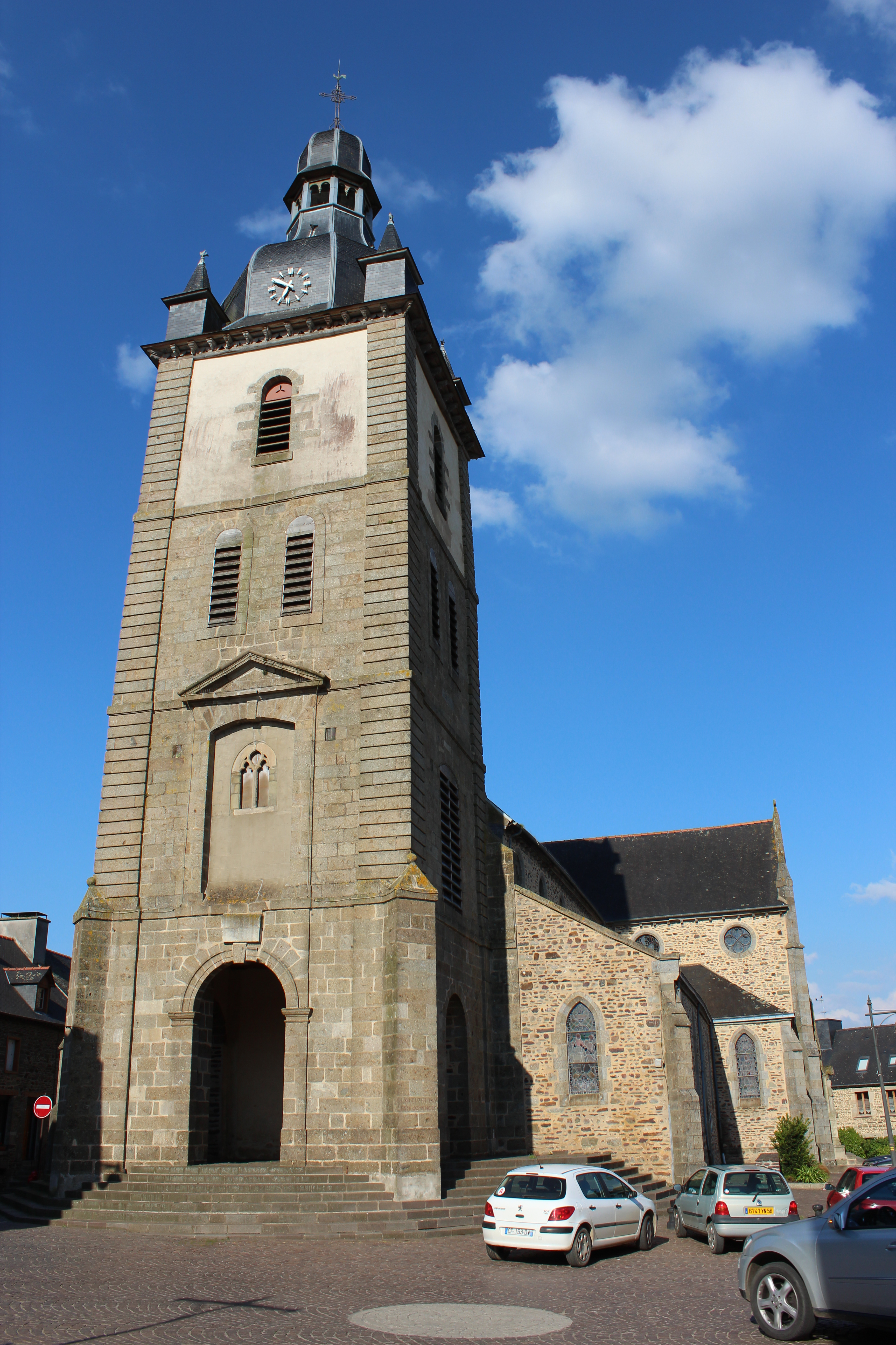 Église Saint-Pierre à Mauron.